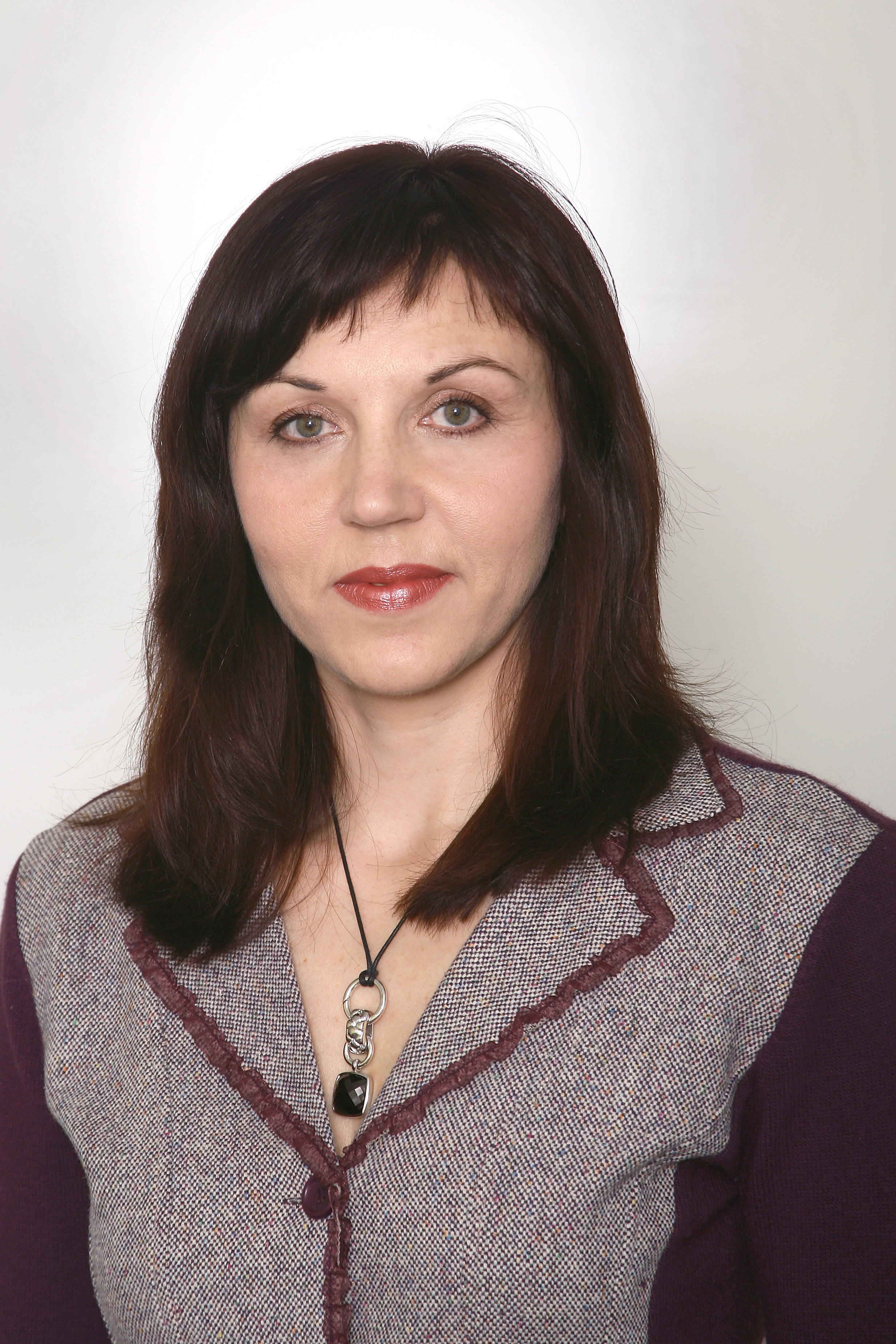 Anna Markina